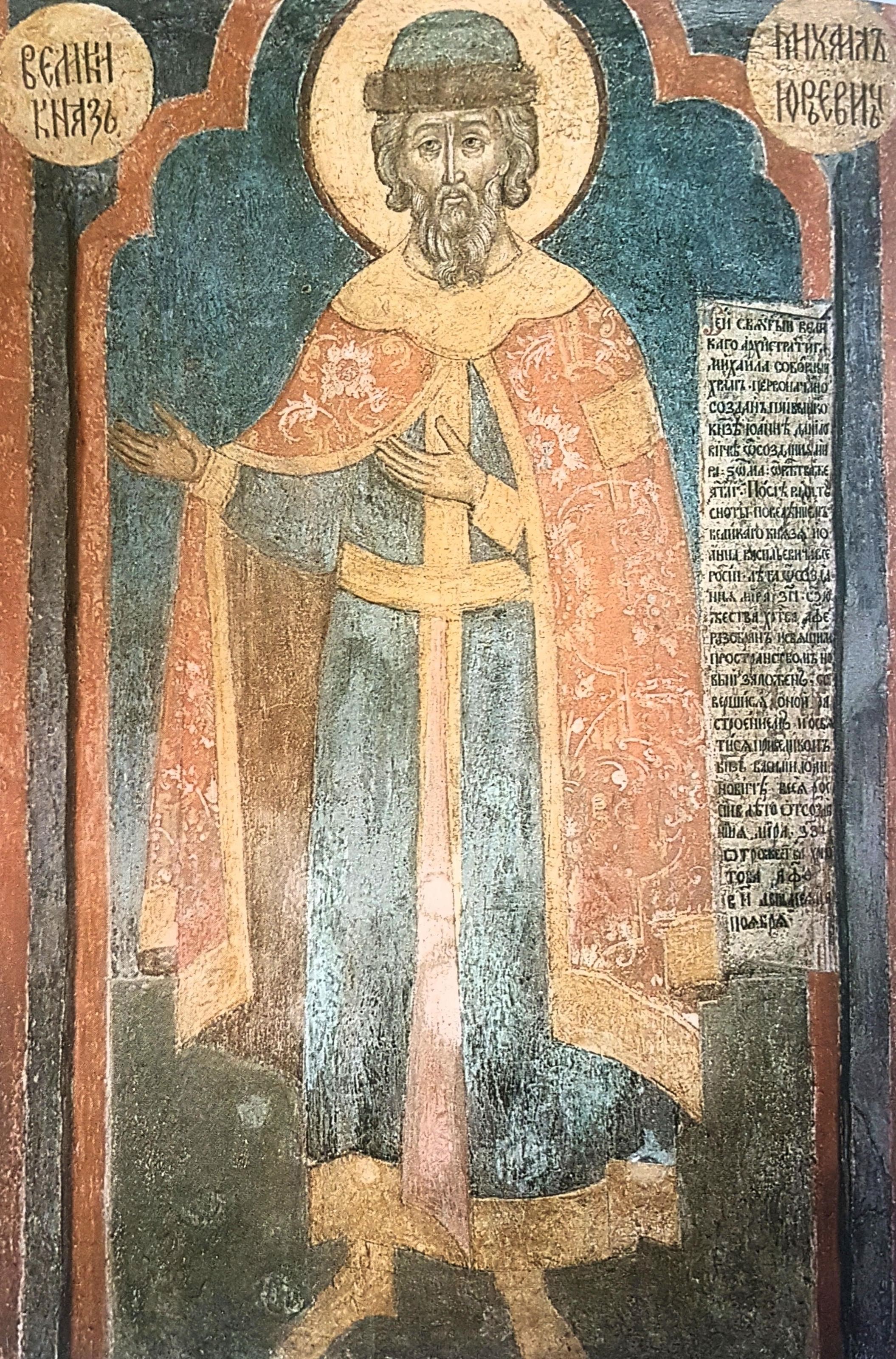 Архангельский собор. Условные портреты князей на столпах